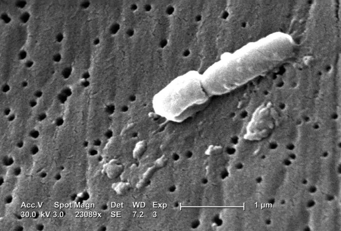 Elektronenmikroskopische Aufnahme des Bakteriums Klebsiella pneumoniae